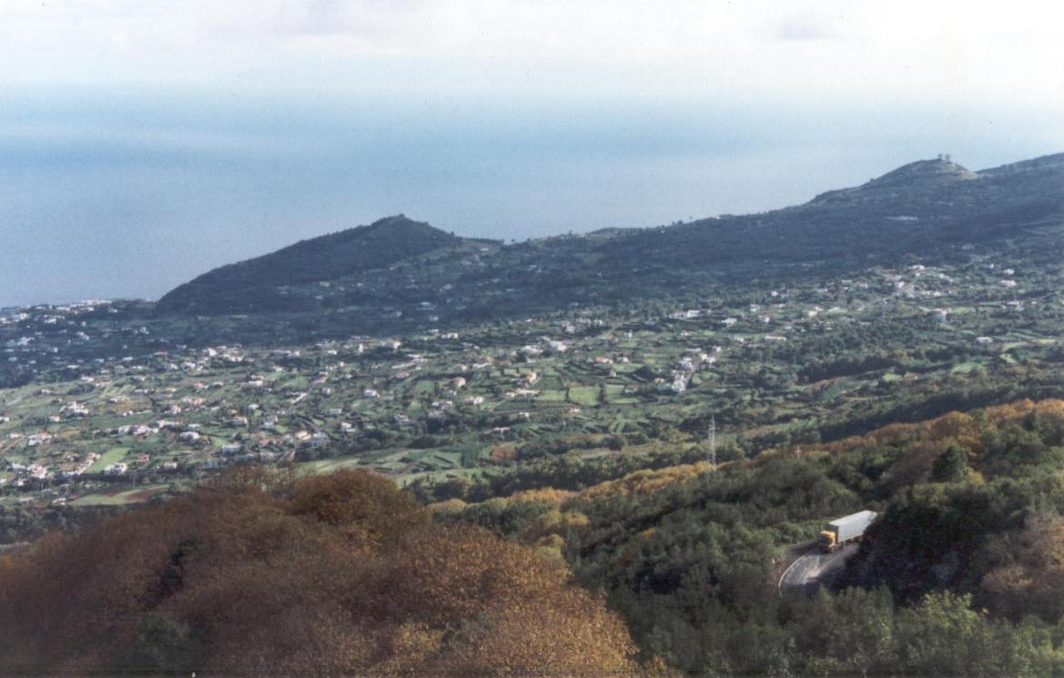 Hábitat disperso en las laderas orientales de la Isla de La Palma. La elevada densidad de población de esta zona (Breña Alta y Breña Baja), se debe a que el relieve es menos inclinado que en otras partes, la agricultura, como puede verse es minifundista, como en la mayor parte de las islas Canarias. Autor: Fev. Fecha: junio 2005